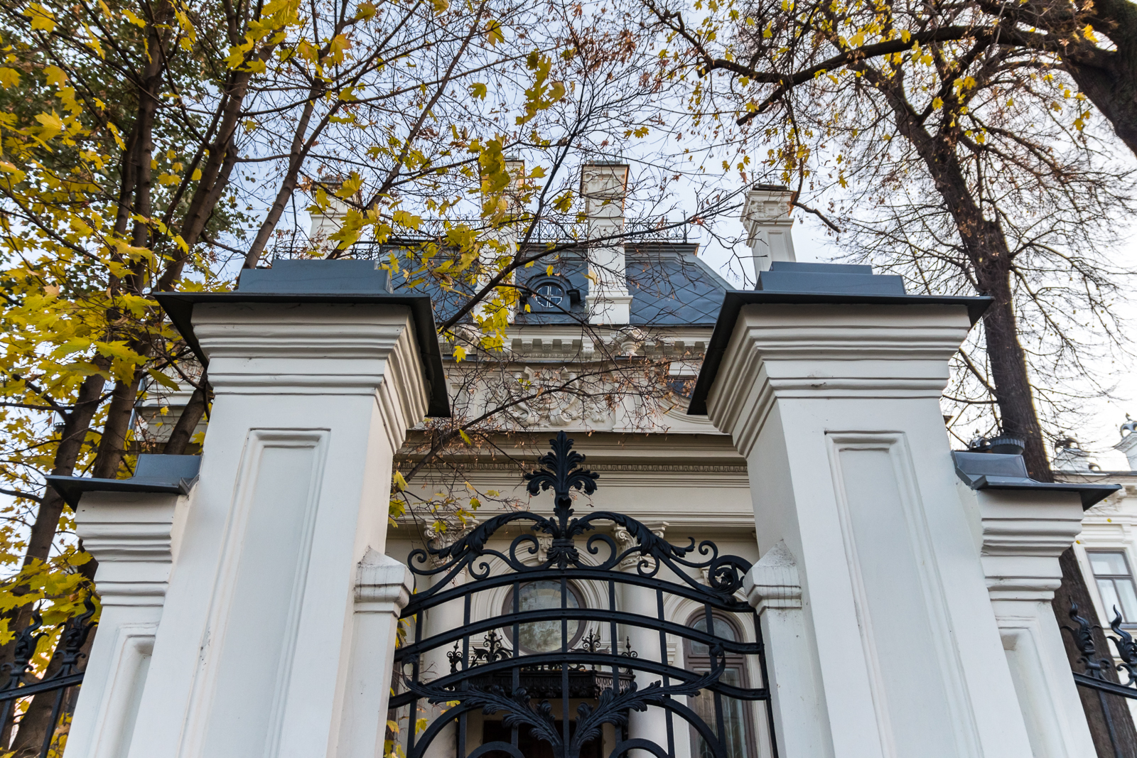 Усадьба сандецкого (Республика Татарстан, Казань, улица Карла Маркса, 64)